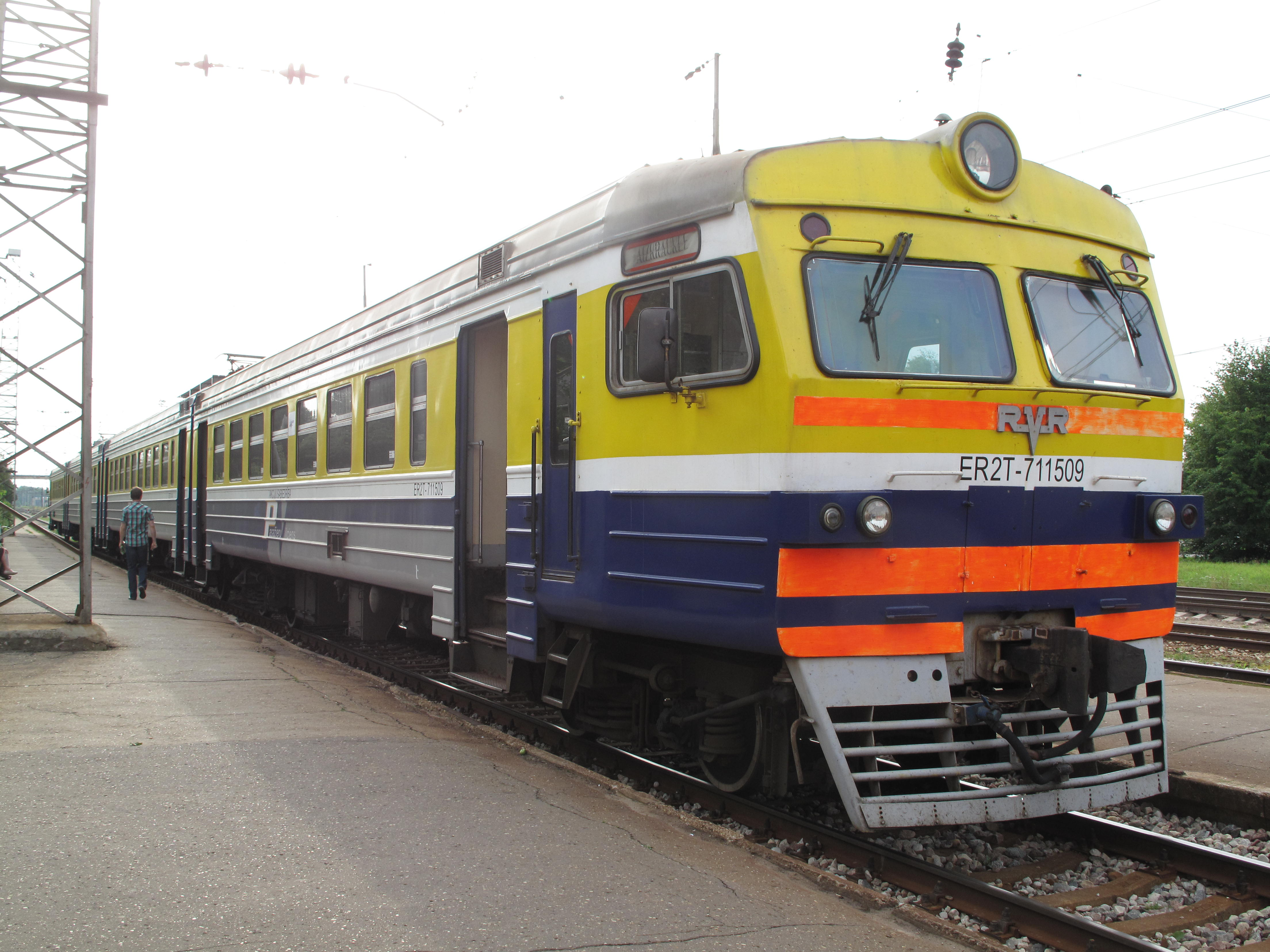 Sloka, osobní vlak